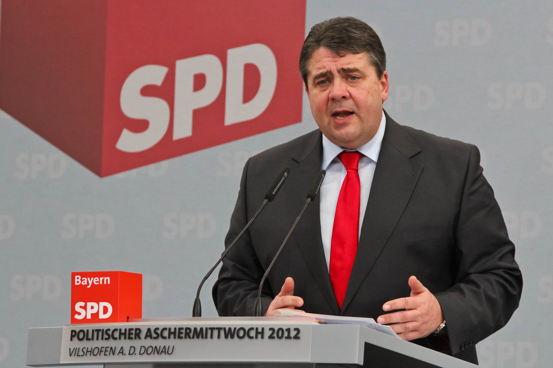 Sigmar Gabriel beim politischen Aschermittwoch der BayernSPD in Vilshofen.